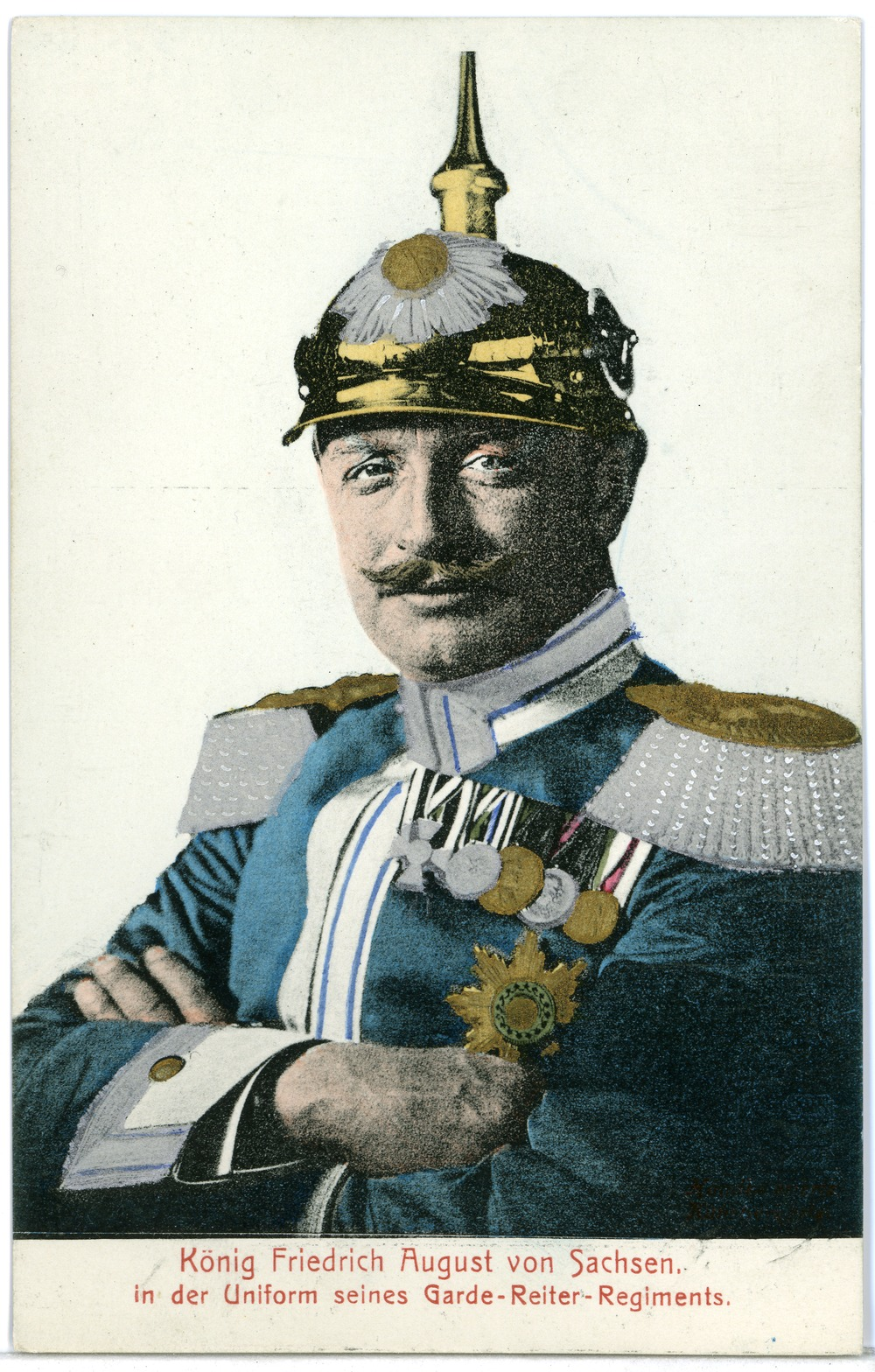 Dresden; König Friedrich August von Sachsen in Uniform This postcard is from publisher Brück & Sohn in Meißen ( This postcard has a unique number 08506 and is available in a higher resolution at the publisher. This images was uploaded in a cooperation project between Wikipedians and the publisher.